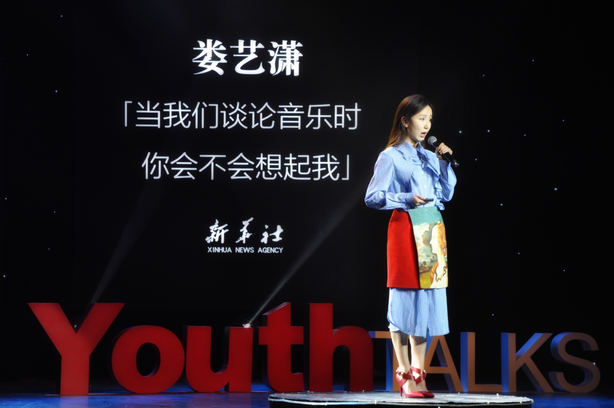 新青年和前几天话剧补～